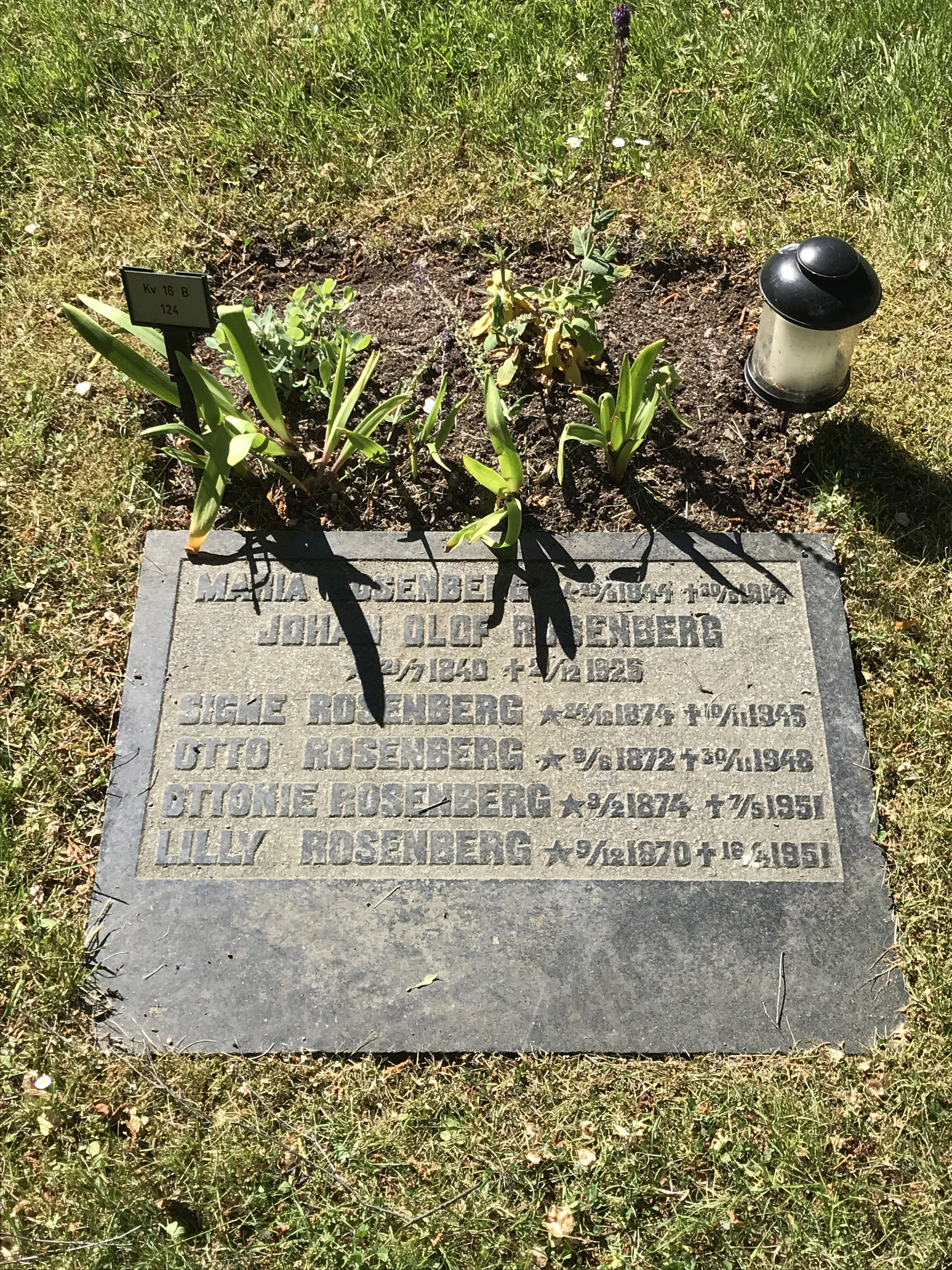 Cemetery